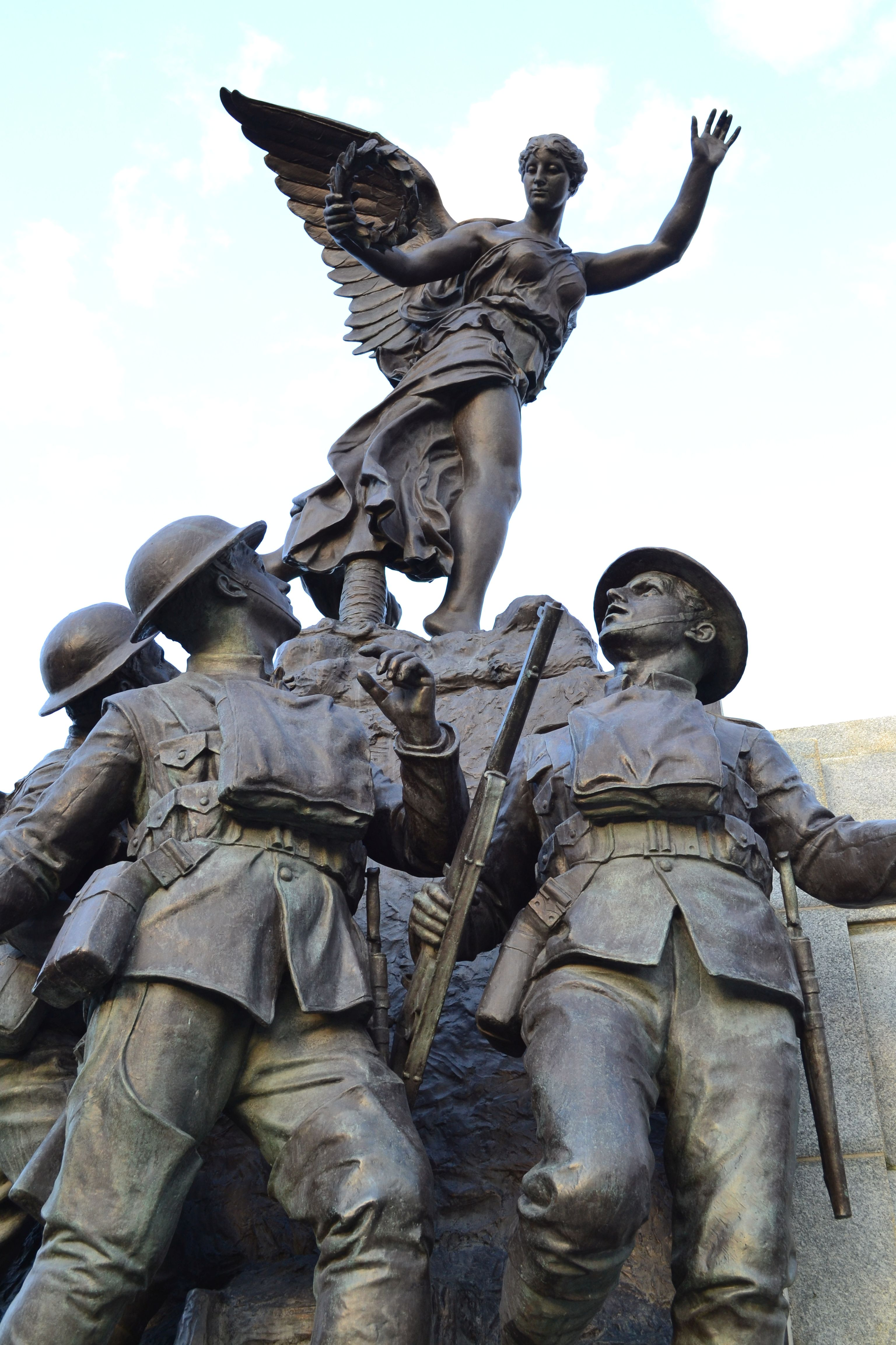 Vue en contreplongée du monument aux Braves-de-Sherbrooke, au Québec